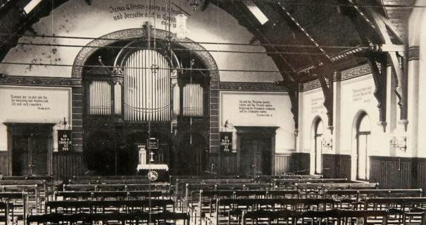 Kirchsaal der alten Nord-Ost-Kirche, Frankfurt am Main, um 1890